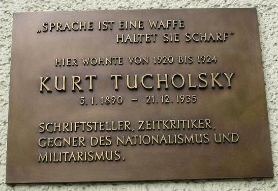 Gedenkschild für Tucholsky, Berlin-Friedenau, Bundesallee 79